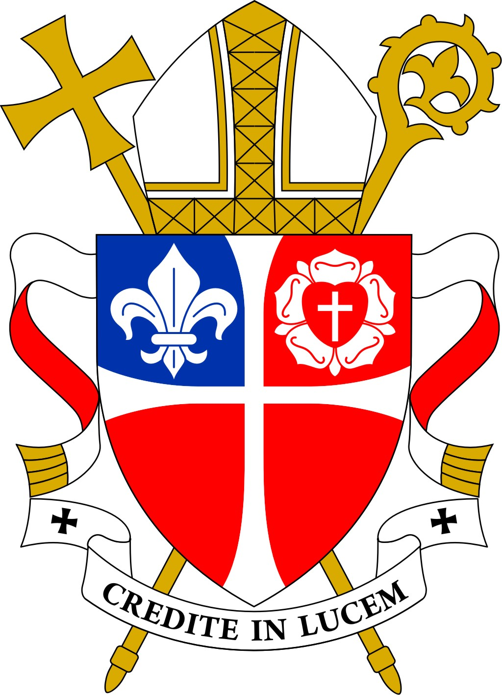 Peapiiskop Urmas Viilma vapp